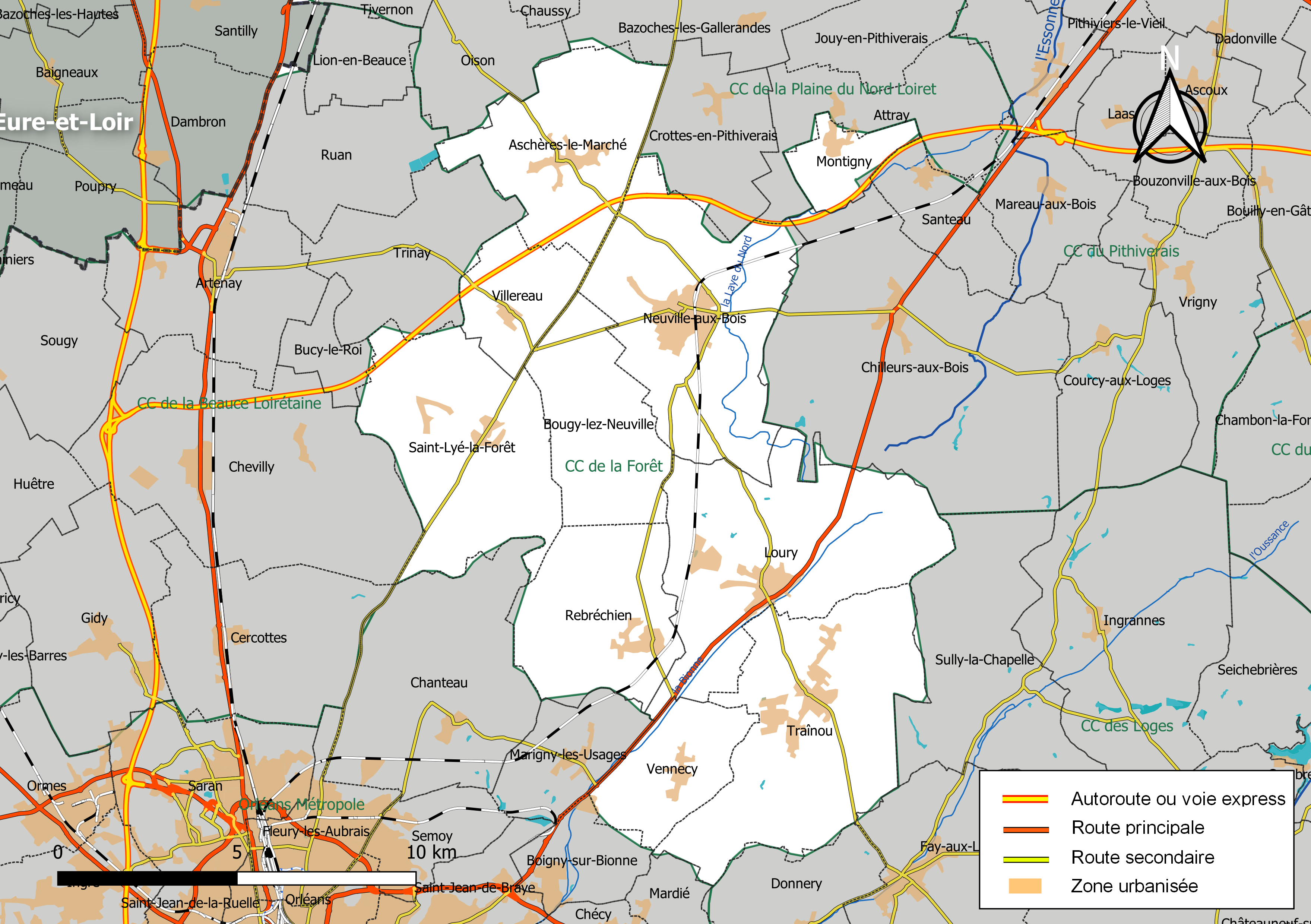 Carte géographique de la communauté de communes de la Forêt, département du Loiret, France. Composition au 1er janvier 2019.